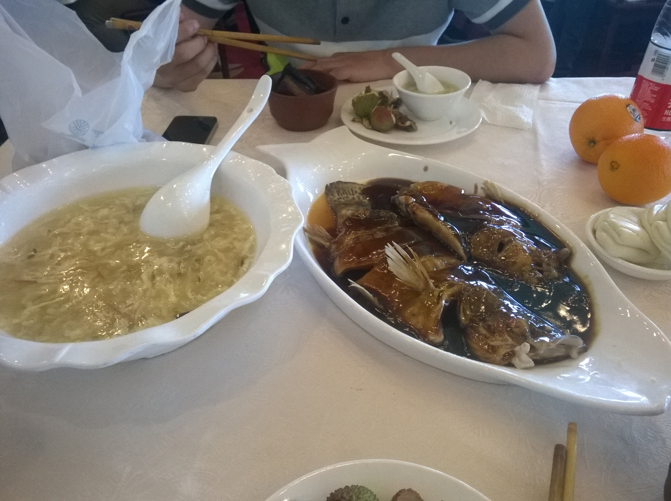 吴语: 楼外楼个西湖醋鱼替羹